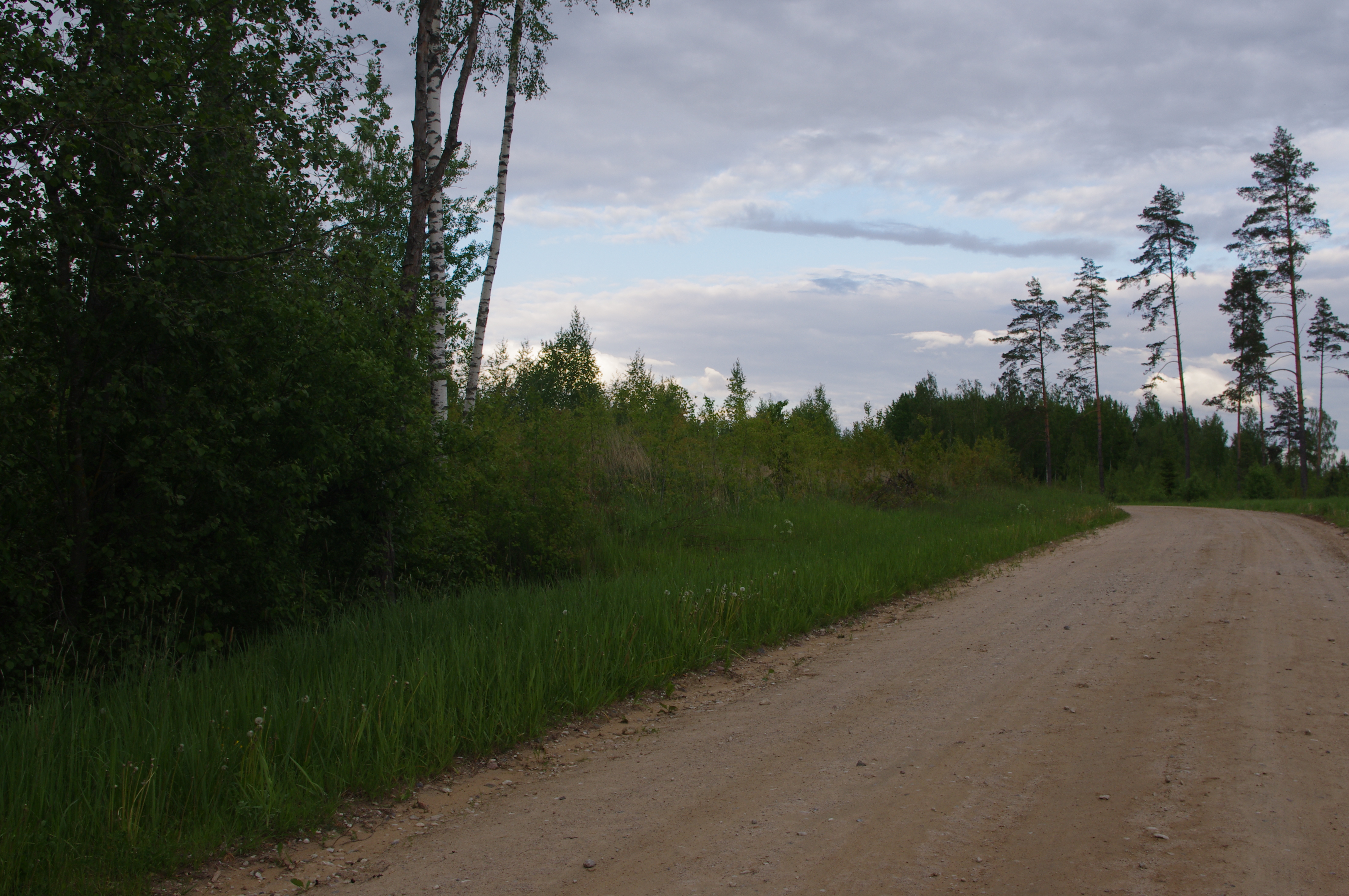 Kääbas